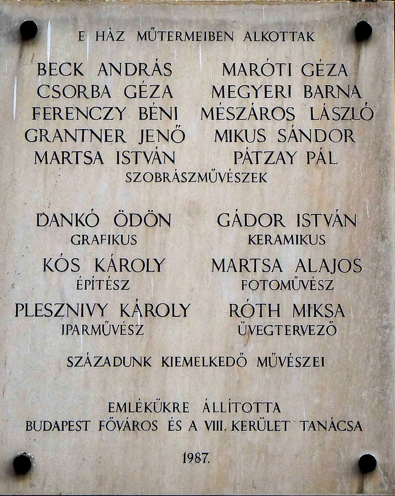 A „Műteremház” – „Művészkert” műtermei neves alkotóinak (Beck András, Csorba Géza, Ferenczy Béni, Grantner Jenő, Martsa István, Maróti Géza, Megyeri Barna, Mészáros László, Mikus Sándor, Pátzay Pál szobrászok, Dankó Ödön grafikus, Kós Károly építész, Plesnivy Károly (itt: Plesznivy) iparművész, Gádor István keramikus, Martsa Alajos fotóművész, Róth Miksa üvegtervező) emléktáblája a Művészház homlokzatán. Budapest, VIII. ker. József utca 37.